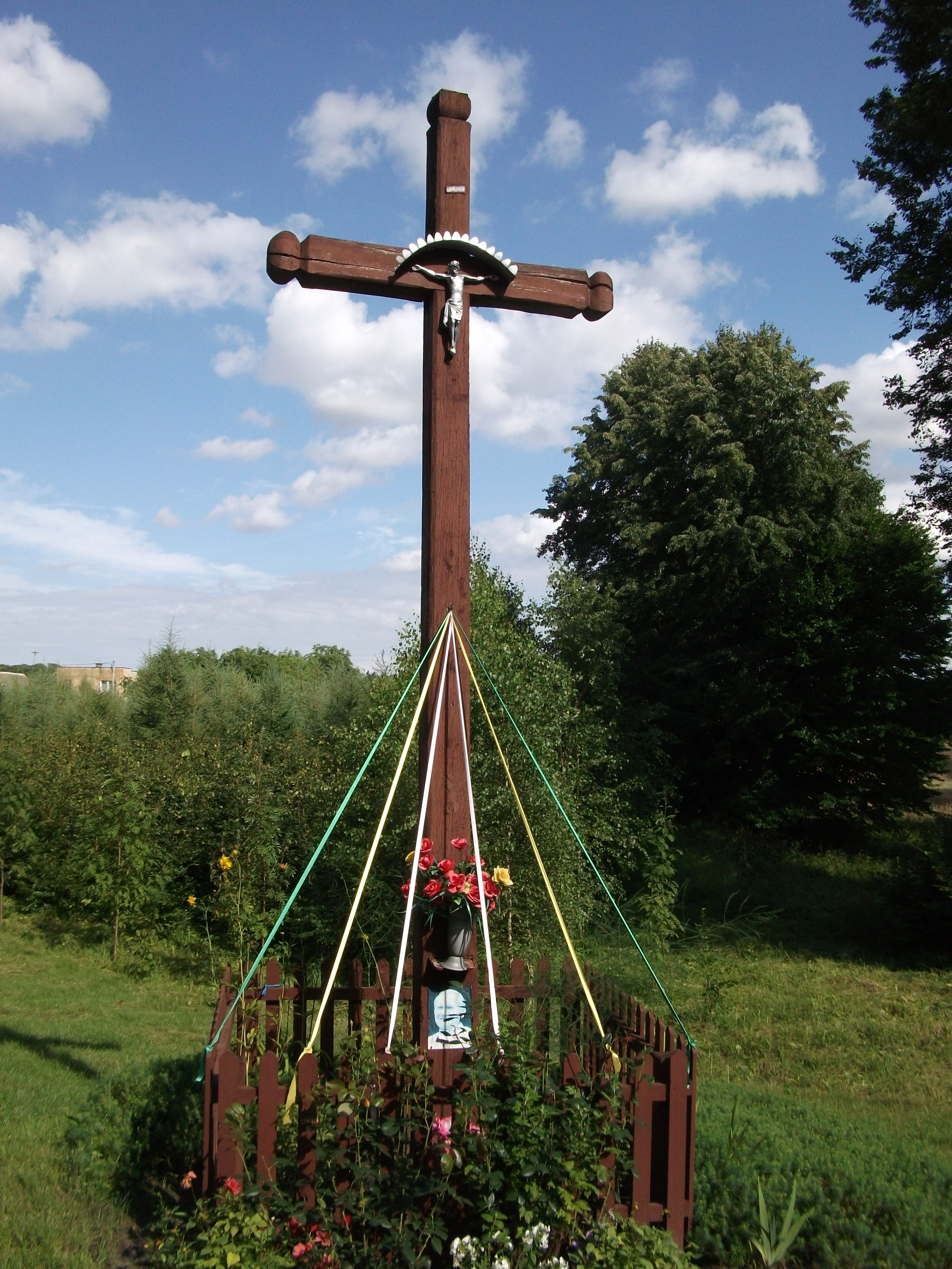 Przydrożny krzyż w miejscowości Budy w Gminie Rogóźno w powiecie grudziądzkim